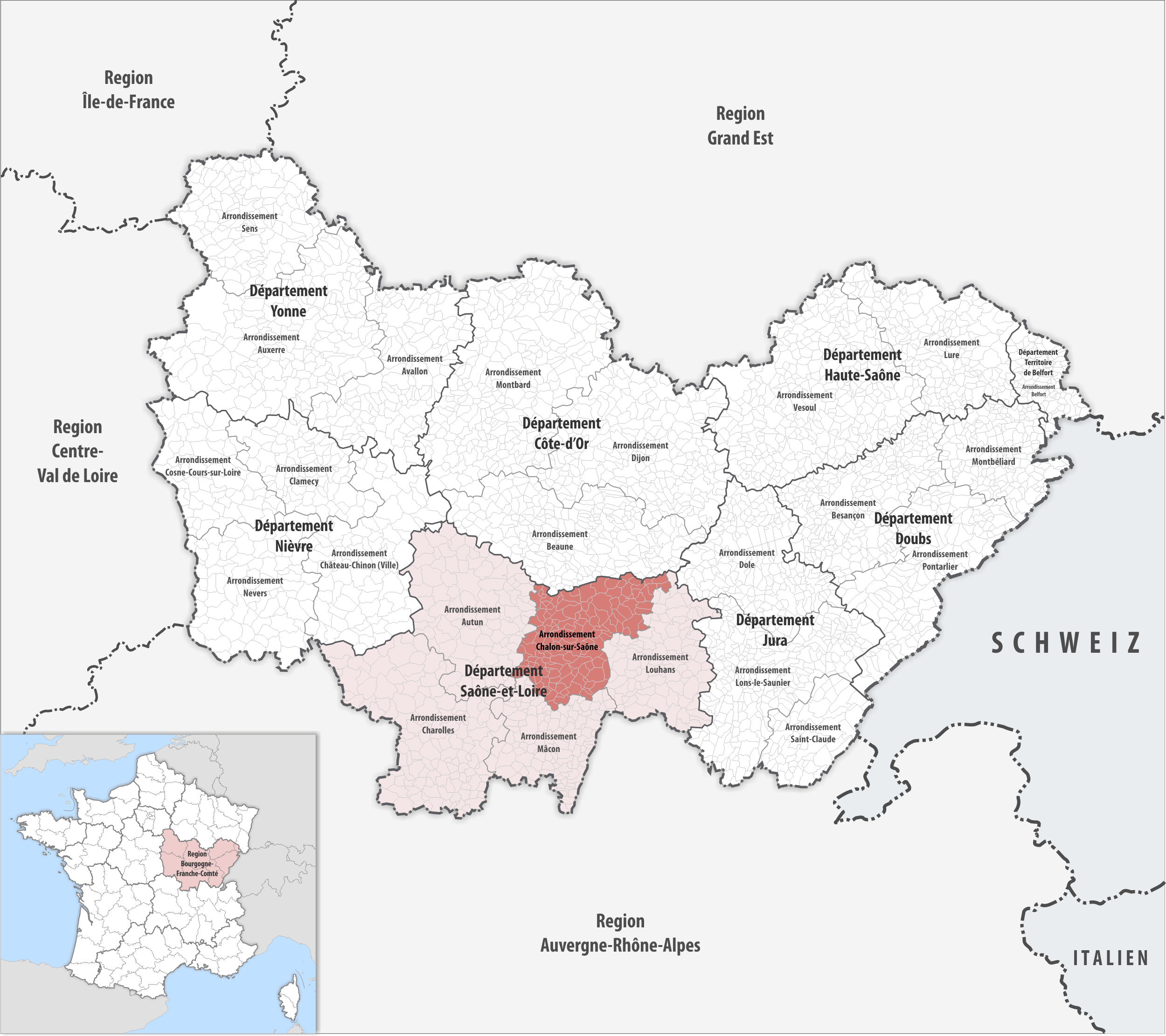 Lage des Arrondissements Chalon-sur-Saône